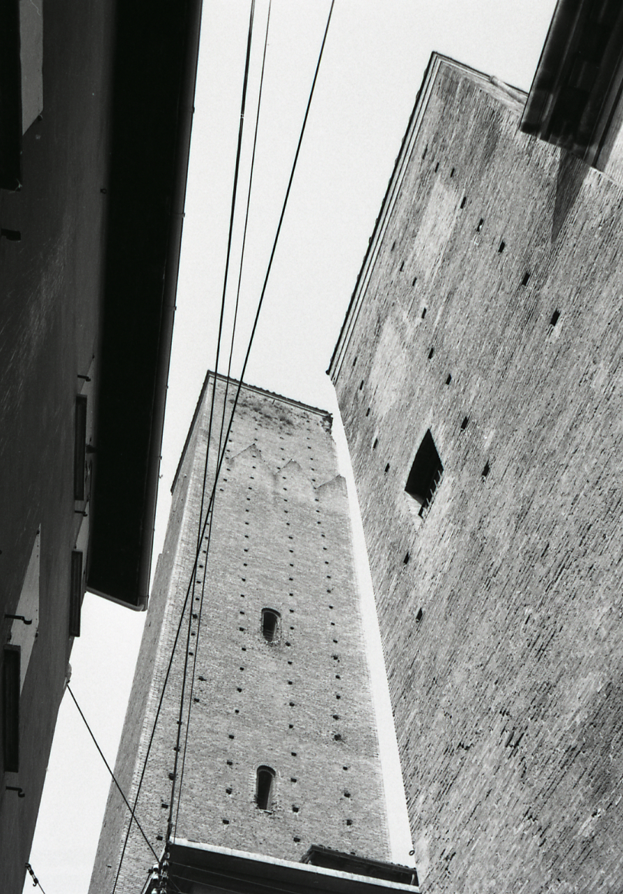 Servizio fotografico : Bologna, 1970 / Paolo Monti. - Strisce: 7, Fotogrammi complessivi: 37 : Negativo b/n, gelatina bromuro d'argento/ pellicola ; 35 mm. - ((I fotogrammi hanno una doppia numerazione. . - Sul portanegativi: Nikmat FP4. - Fonte: Agenda di Paolo Monti: Monti - Agenda 1970 (1970), presso Archivio Paolo Monti